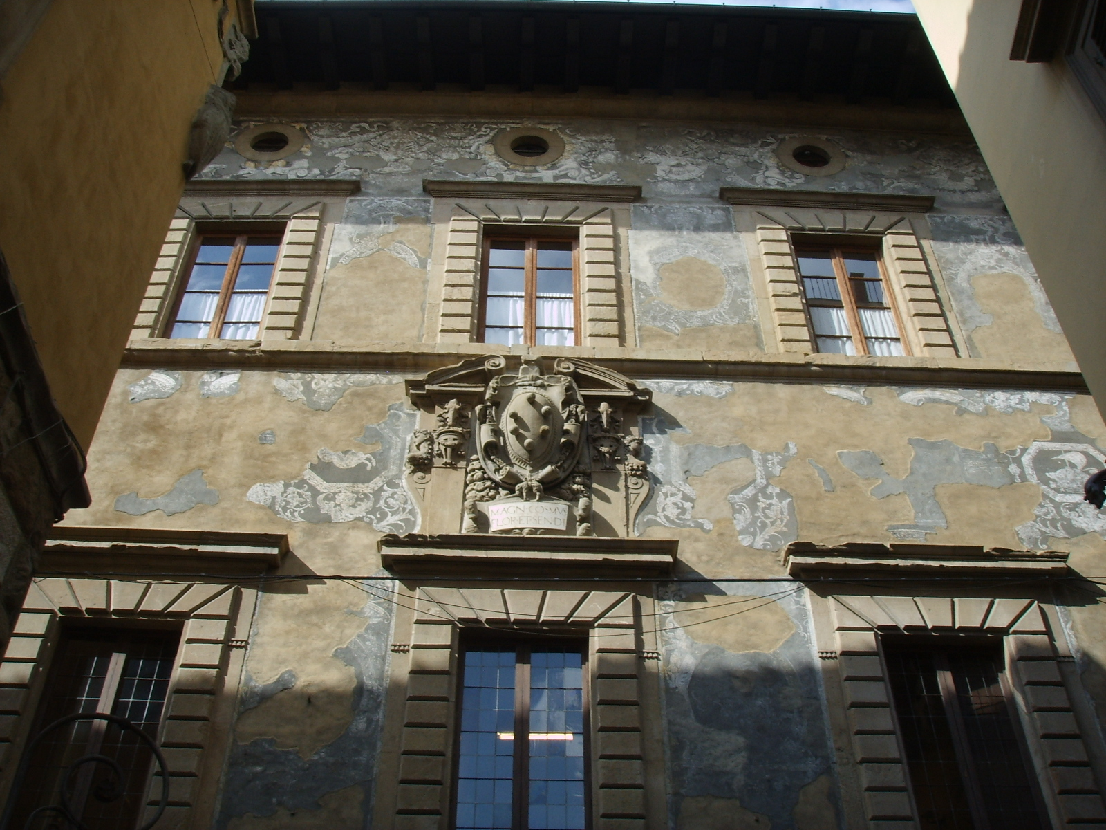 Palazzo ramirez de Montalto, stemma medici